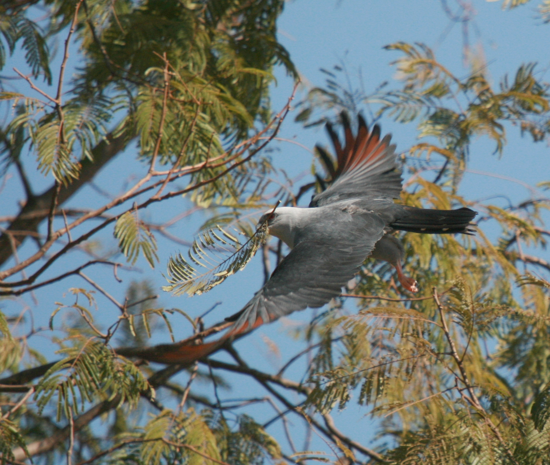 Ictinia plumbea carrying nest material, Brazil.